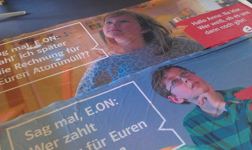 Unter dem Motto "Sag mal e.on, geht's noch?" macht .ausgestrahlt 2014/15 auf die Abspaltung des Atomgeschäfts des Konzerns in eine "Bad Bank" aufmerksam.